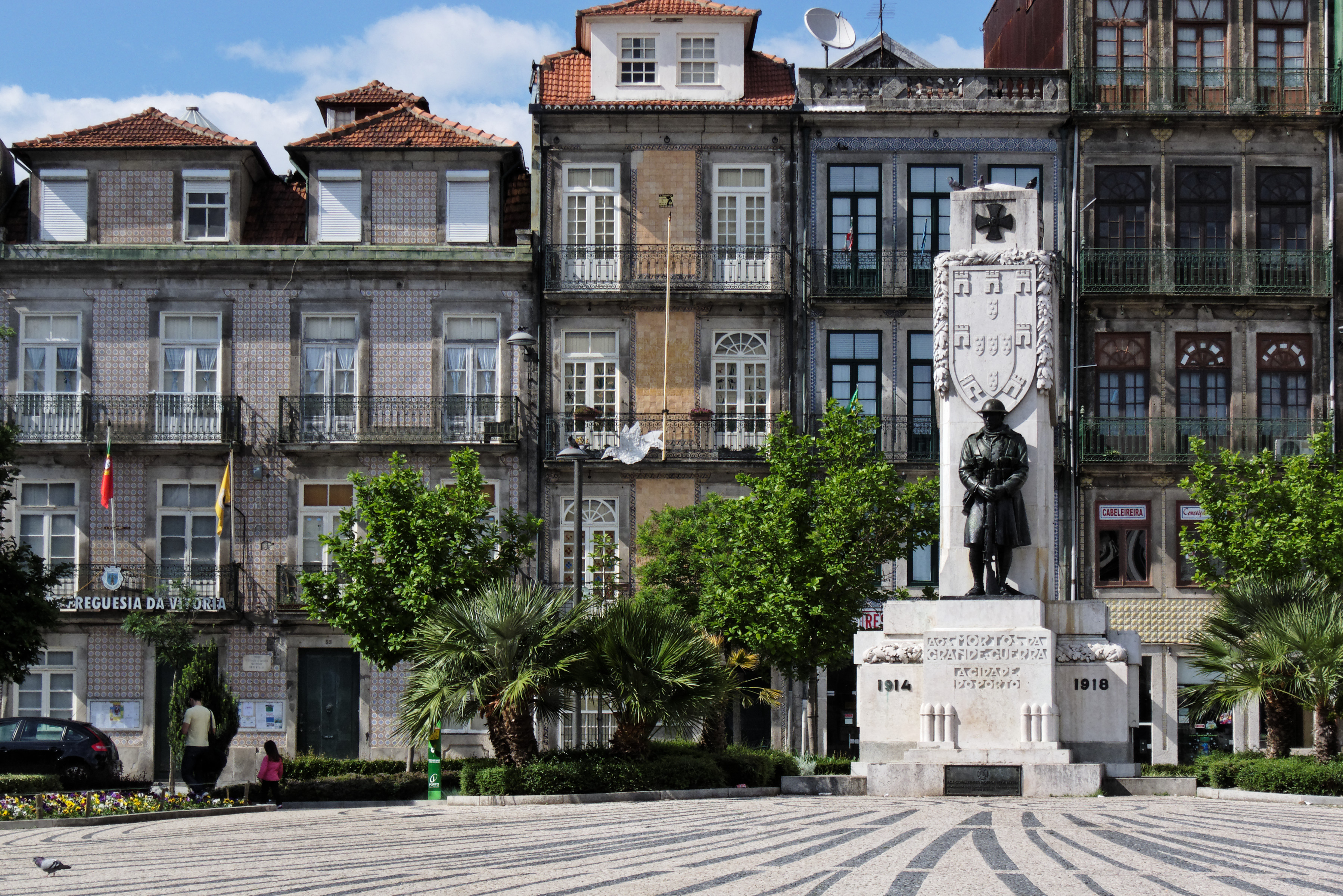 Monumento a los muertos de la primera guerra mundial ubicado en la plaza de Carlos Alberto. Oporto, Portugal.